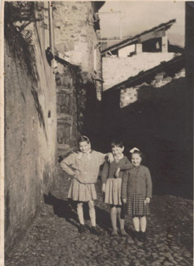 Sellero anni 60 - Bambine in Via S. Briscioli